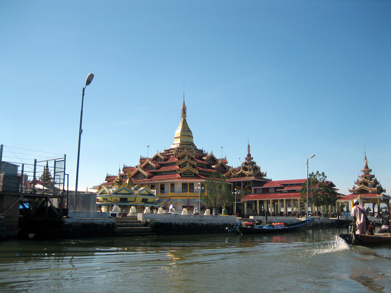 Hpaung Daw U Pagoda, Inlay Lake, Shan State, Myanmar (Burma)